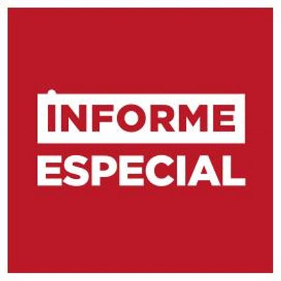 Logo Informe Especial 2018